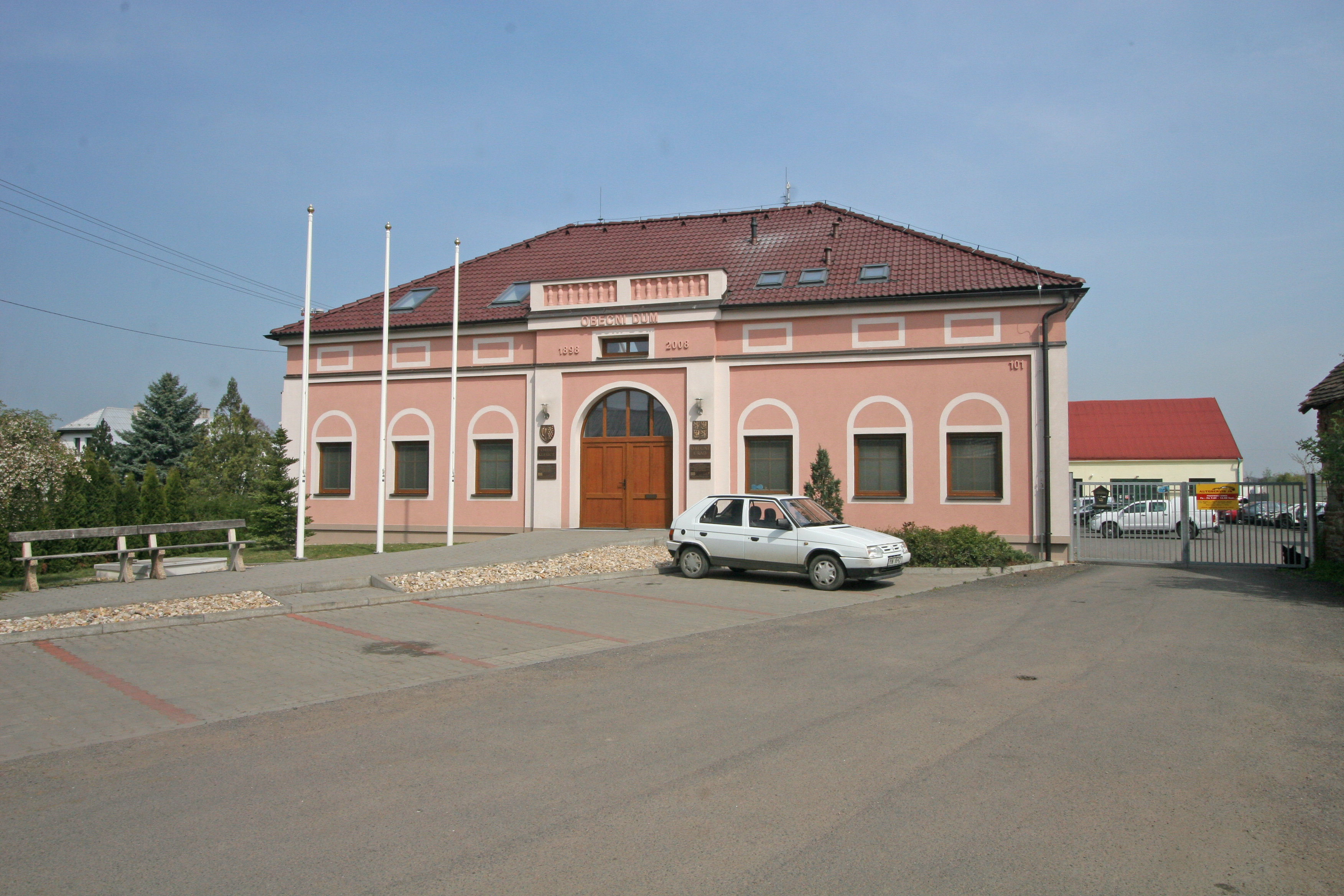 Klešice obecní úřad